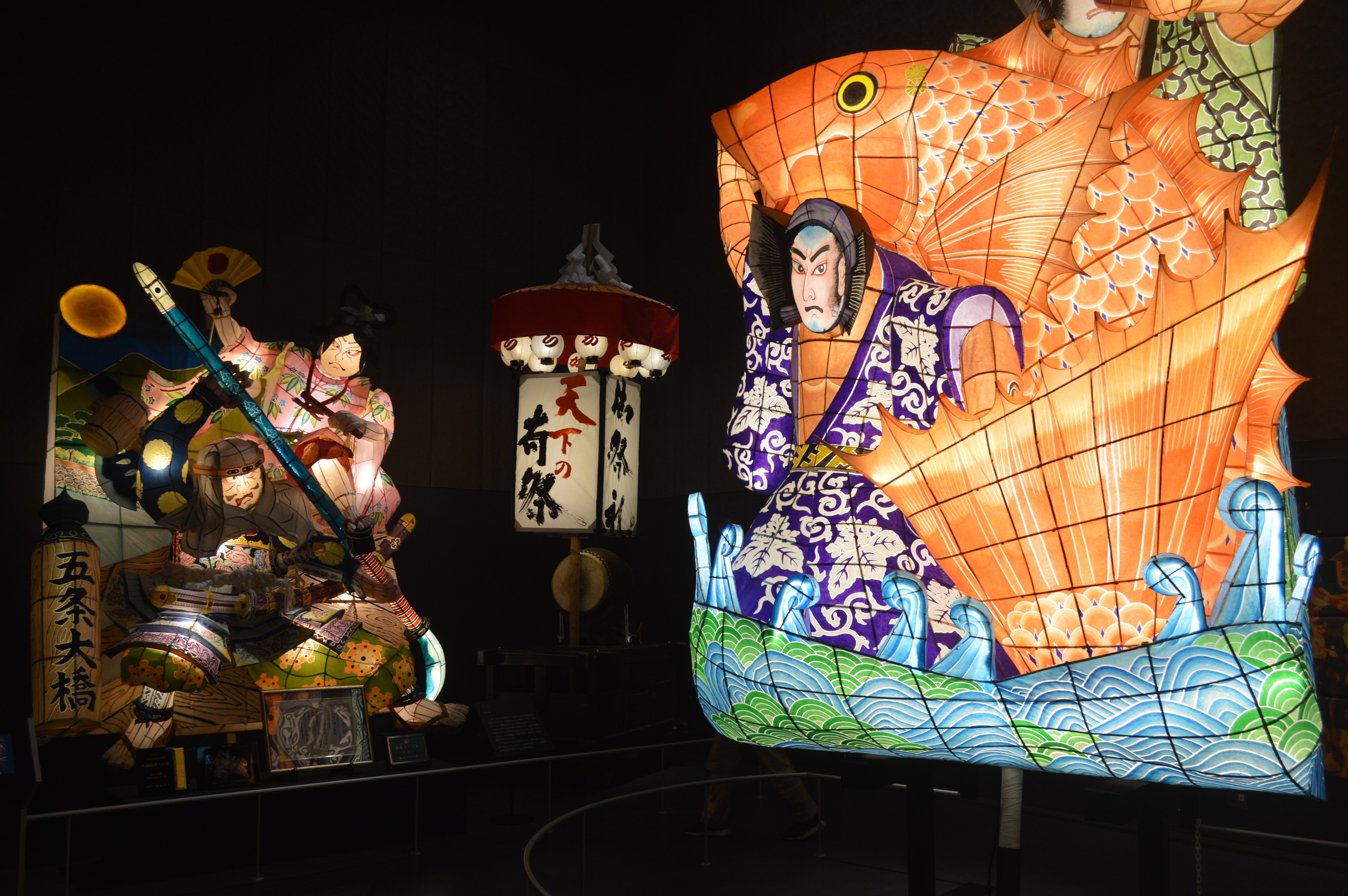 愛知県刈谷市にある刈谷市歴史博物館。「おまつり広場」にある万燈祭りの展示。